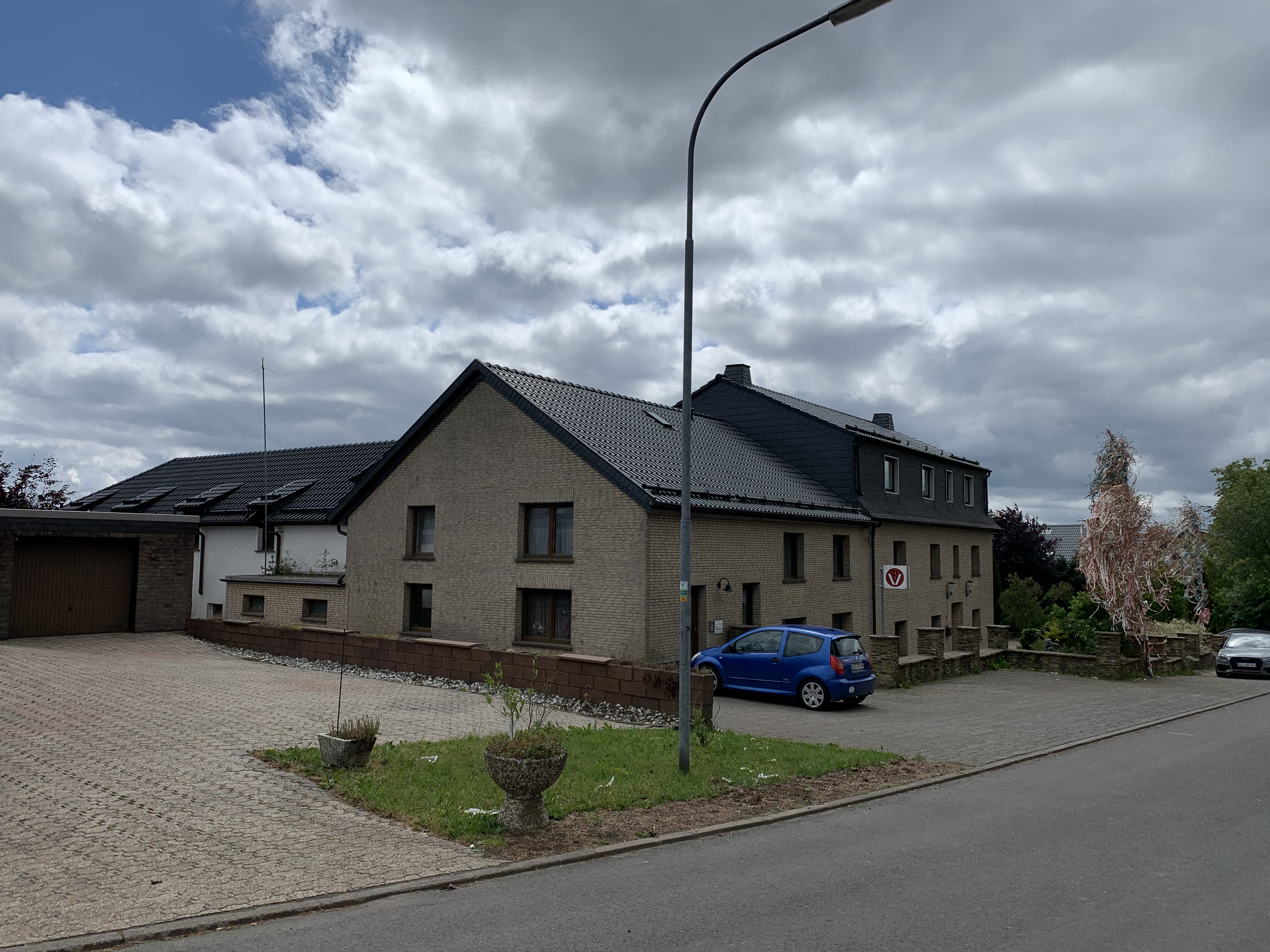 Udenbreth ist ein Ortsteil der Gemeinde Hellenthal im nordrhein-westfälischen Kreis Euskirchen